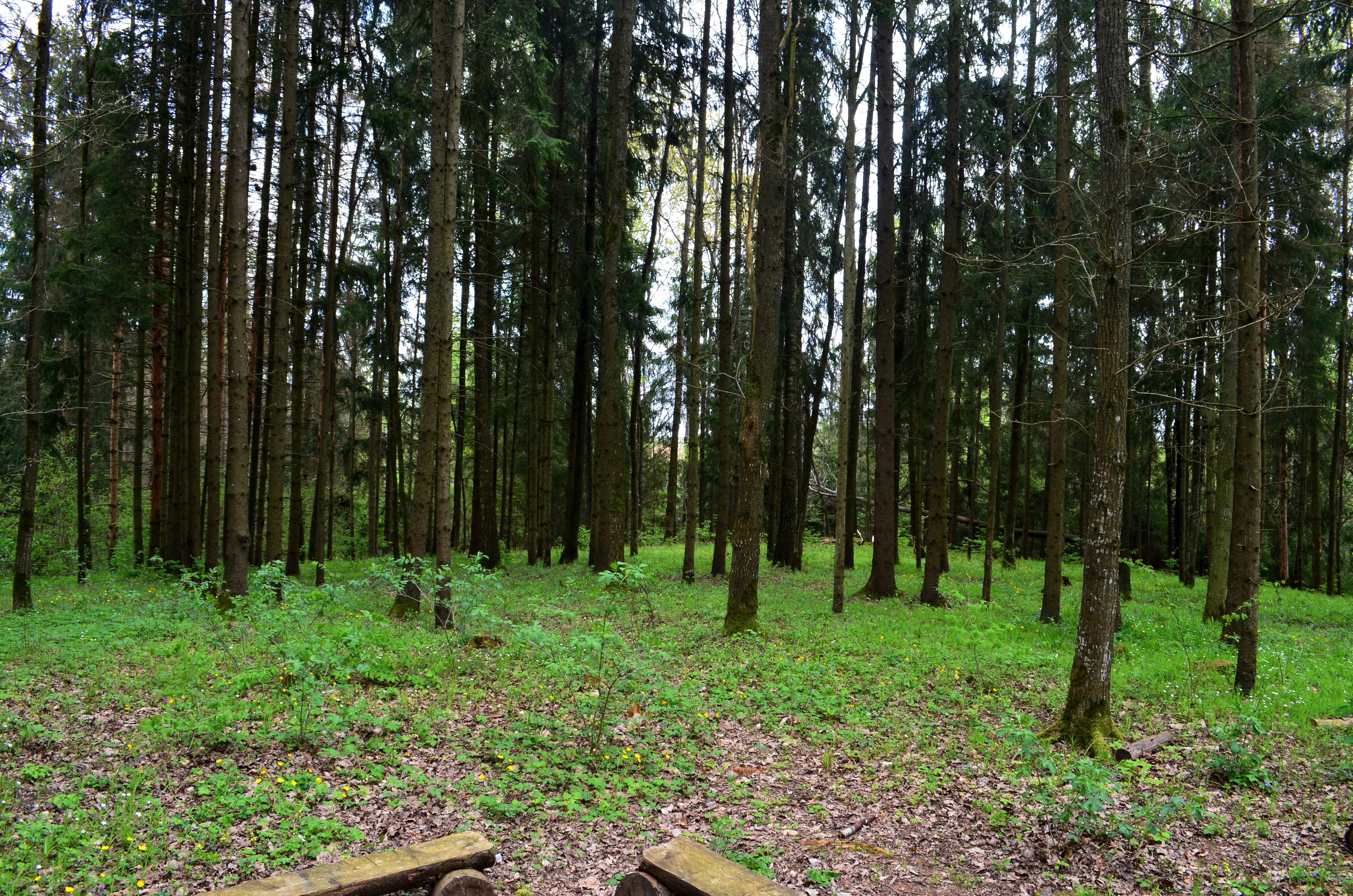 Plokščių piliakalnis, Šakių raj.